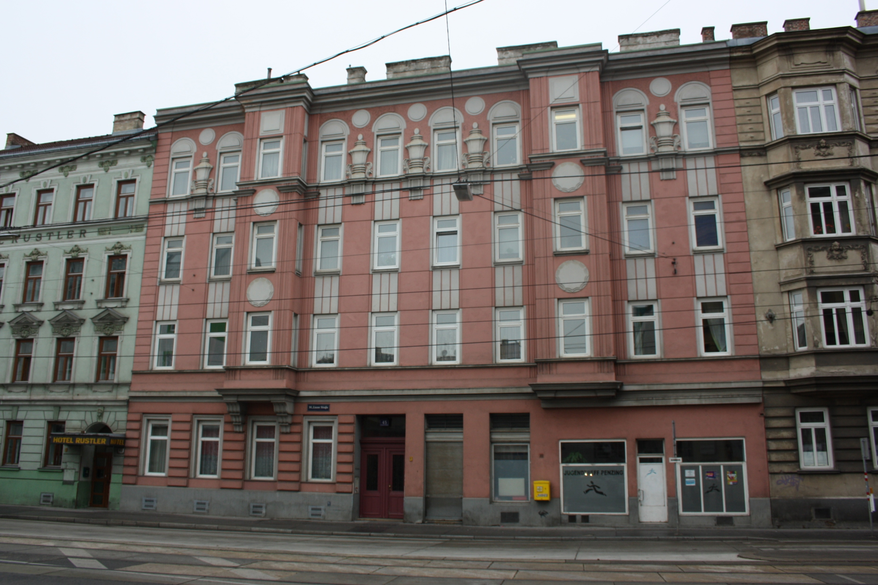 Miethaus Linzer Straße 45 in Wien-Penzing, erbaut 1900/1901 im Secessionsstil, Architekt: Karl Heinrich Brunner.